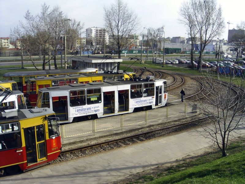 Pętla tramwajowa Warszawa Os. Górczewska